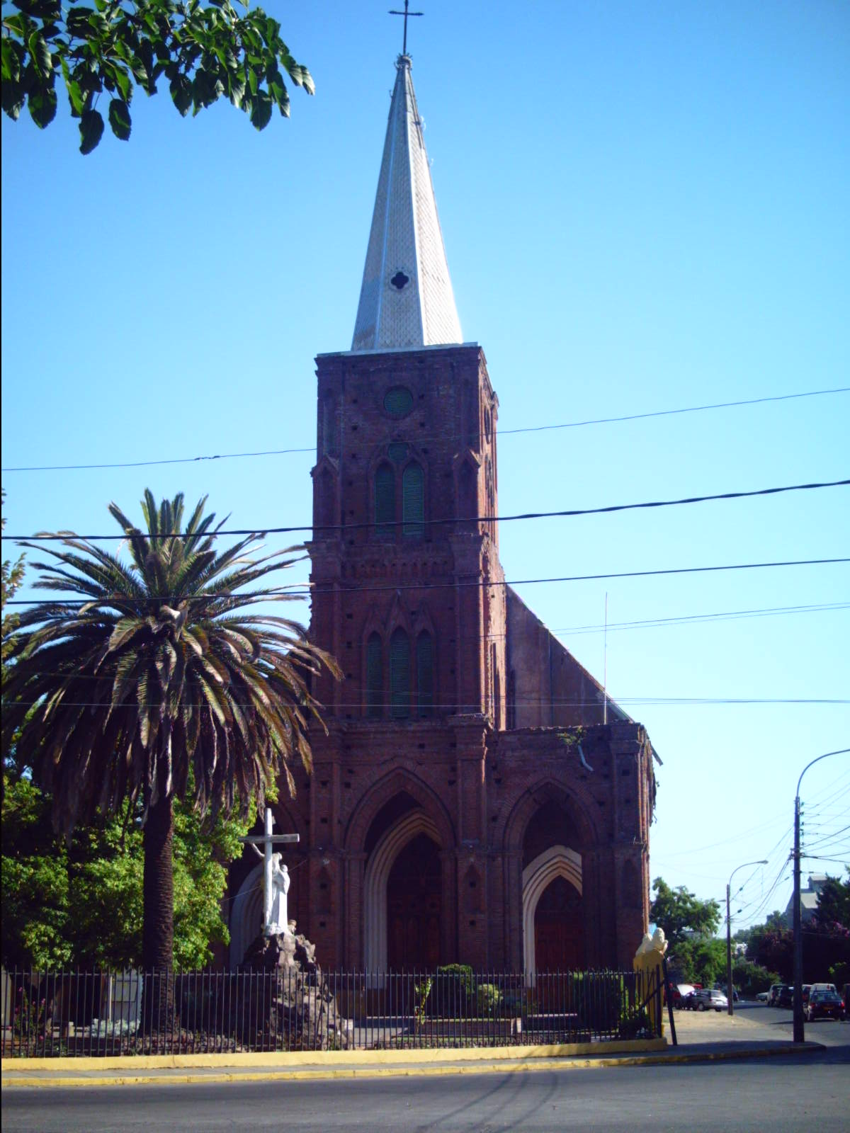 San Francisco church in Curicó, Chile (Iglesia de San Francisco de Curicó, Chile)